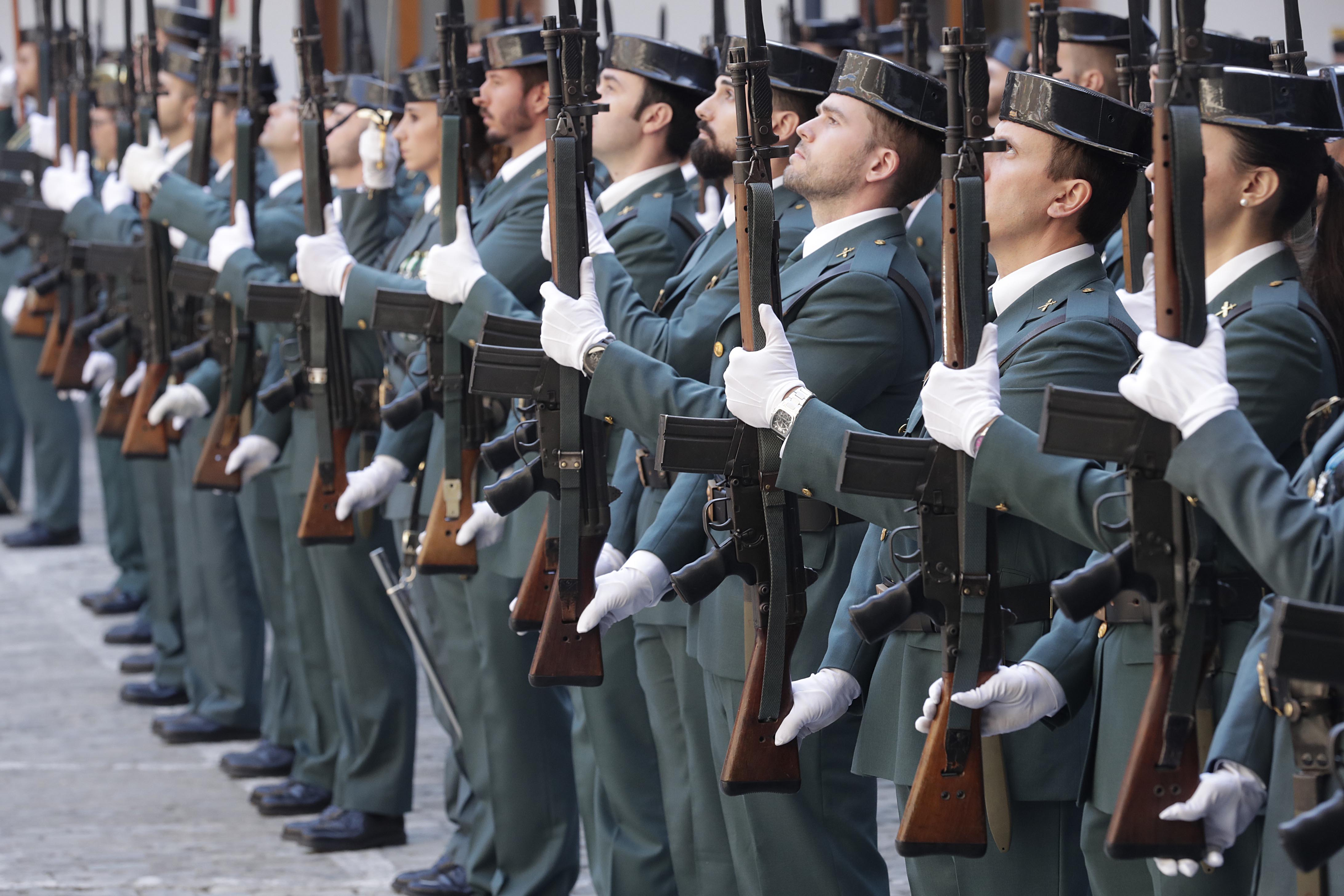 Celebración del día de la patrona de la Guardia Civil, la Virgen del Pilar, en el acuartelamiento de Batalla del Salado. Parada militar, desfile e imposición de condecoraciones.